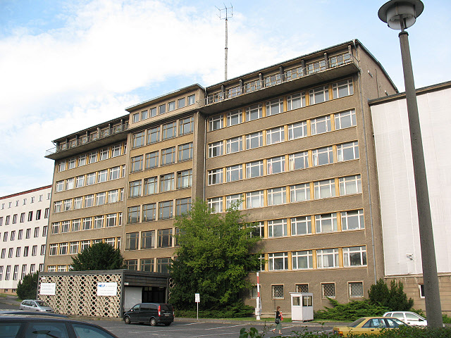 Ehemalige Zentrale der Stasi (Former secret police headquarters), Ministerbüros im 2. OG